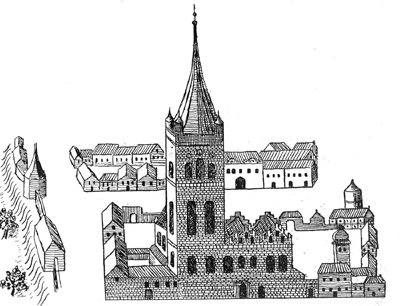 Kościół Mariacki od zachodu. Rycina wykonana przez Heinricha Kotego przed 1625 r.; za: K. Kalita-Skwirzyńska, 2003. (Prawdopodobnie prawo autorskie nie obejmuje skanów starych książek).